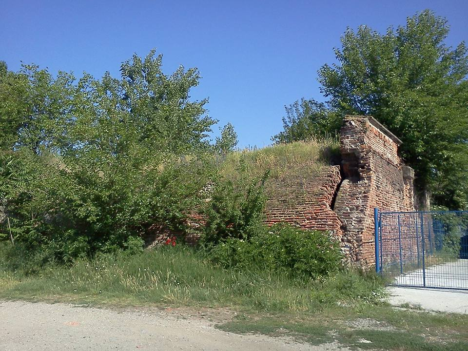 Ruinele conacului Brâncoveanu-Mavrocordat